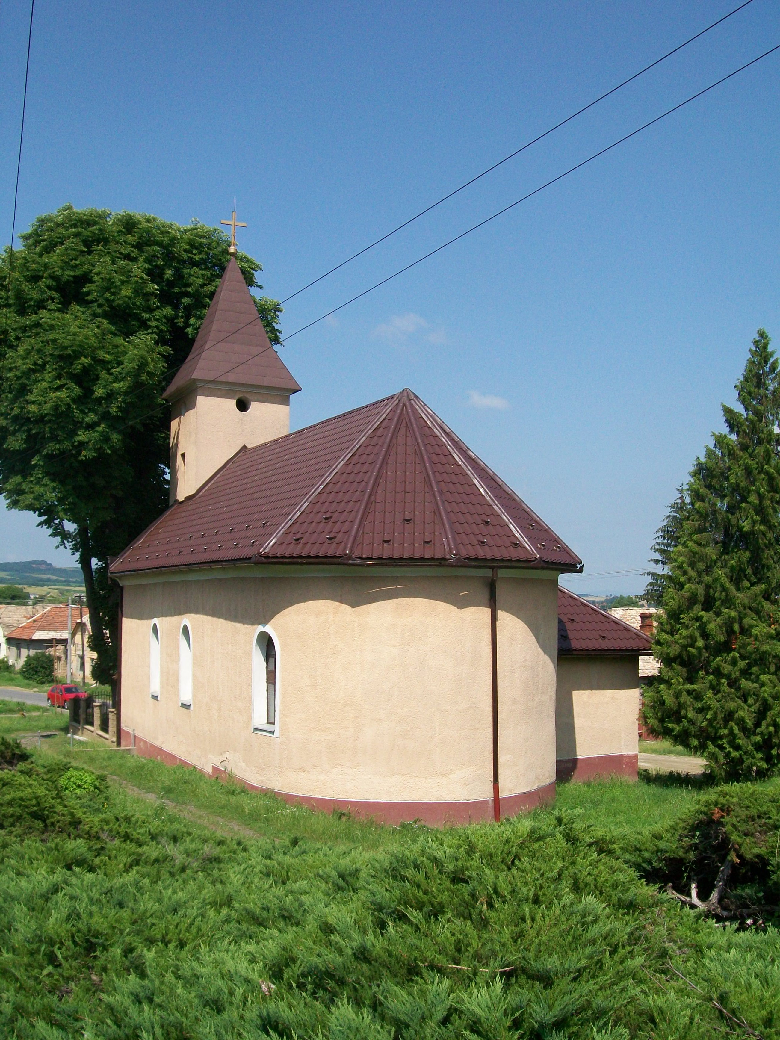 Rímskokatolícky Kostol Nanebovstúpenia Pána v Beline (okr. Lučenec)